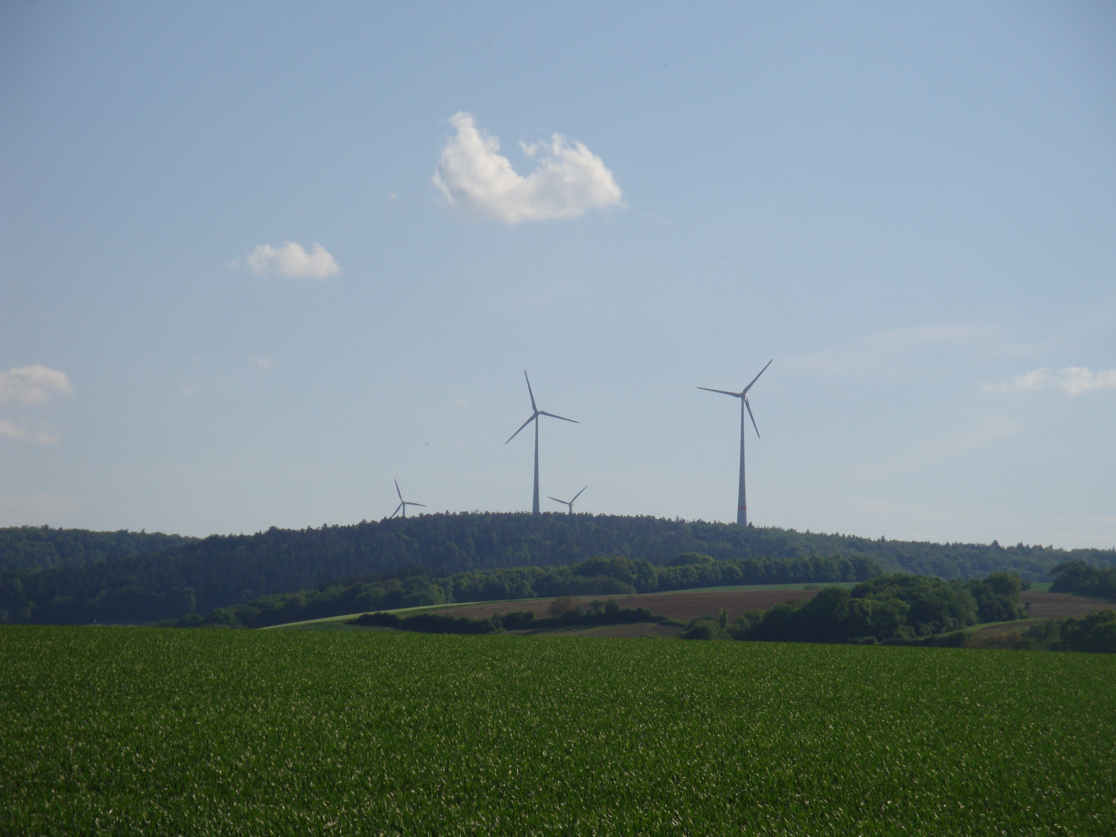 Windpark Binselberg, Groß-Umstadt, 2 Fuhrländer FL1000 (links) und zwei Enercon E-82-2 MW